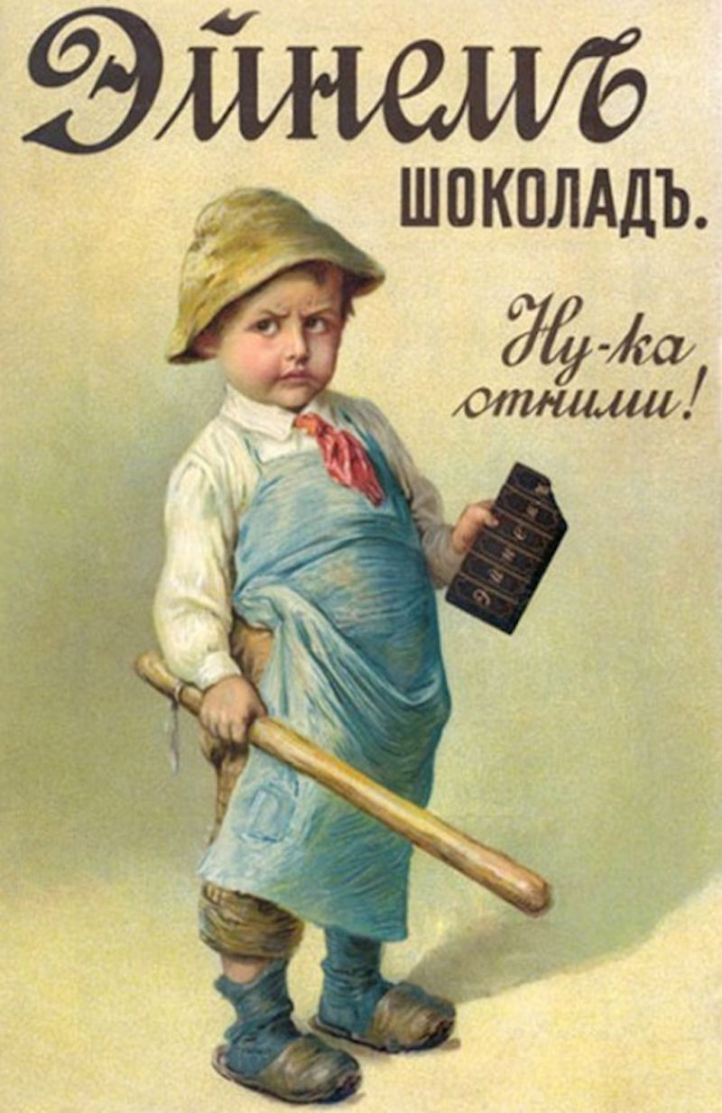 Товарищество "Эйнем". Щоколад "А ну-ка, отними!" До 1917 года.